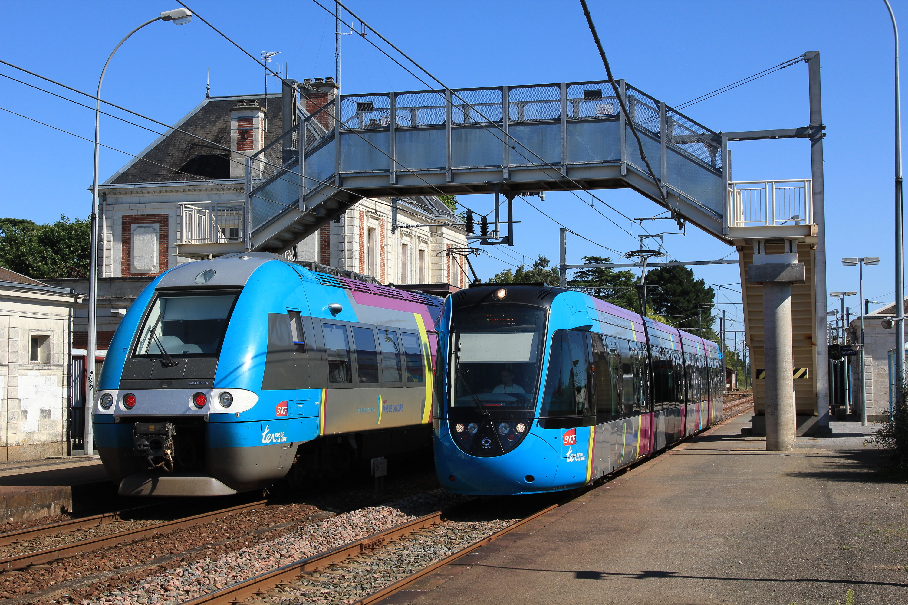 Un tram-train Clisson - Nantes et une ZGC Nantes - Les Sables se croisent en gare de Clisson, sous la passerelle qui sera remplacée quelques années plus tard.